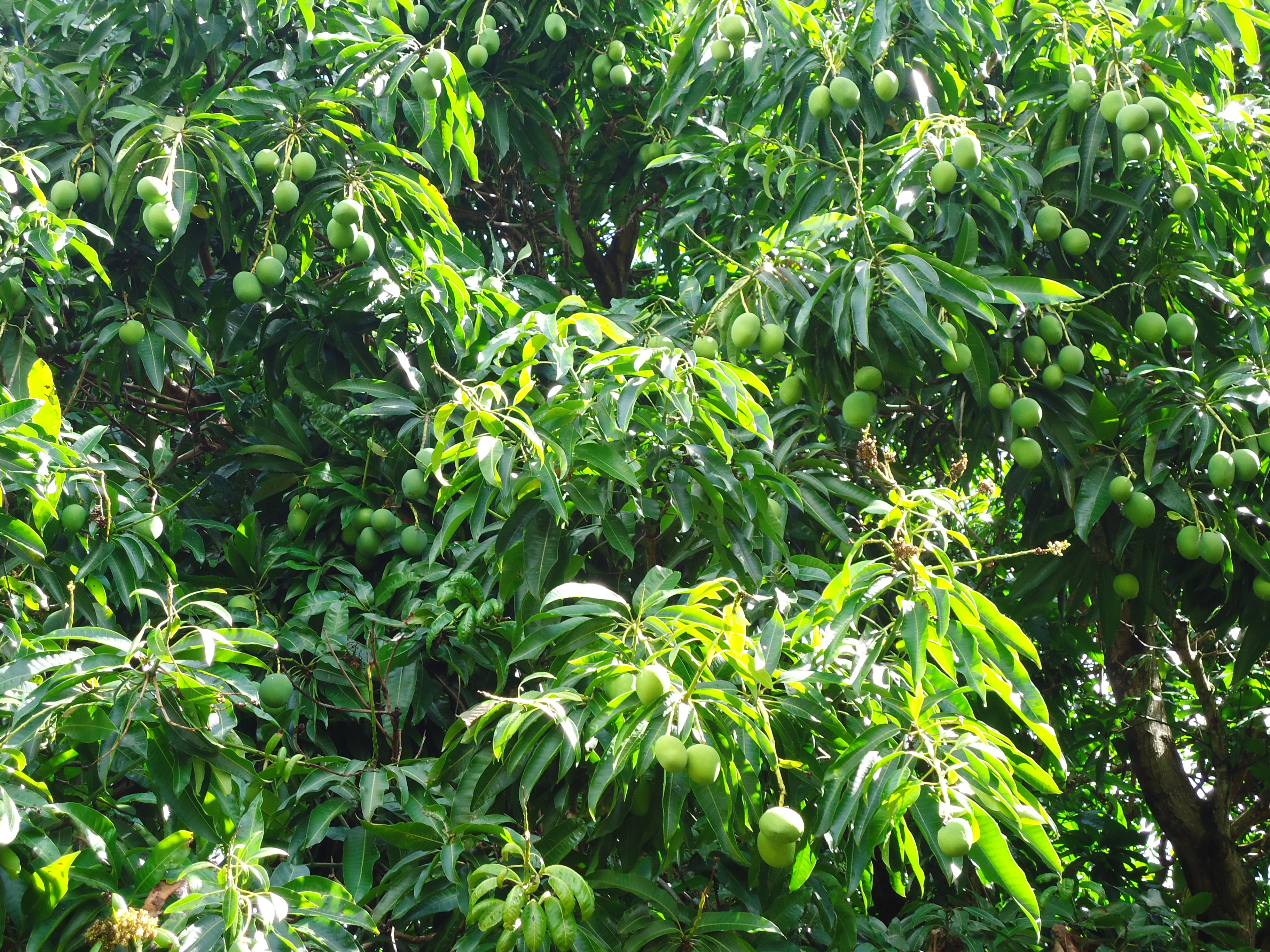 Mangueira com várias frutas ainda verdes.